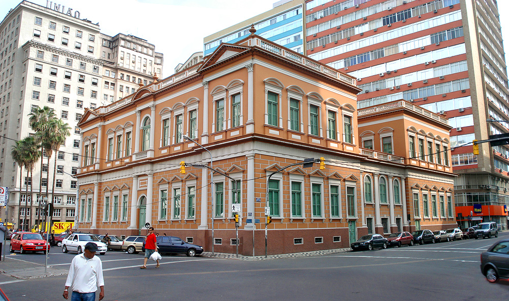 Vista traseira do Paço Municipal de Porto Alegre, Brasil.